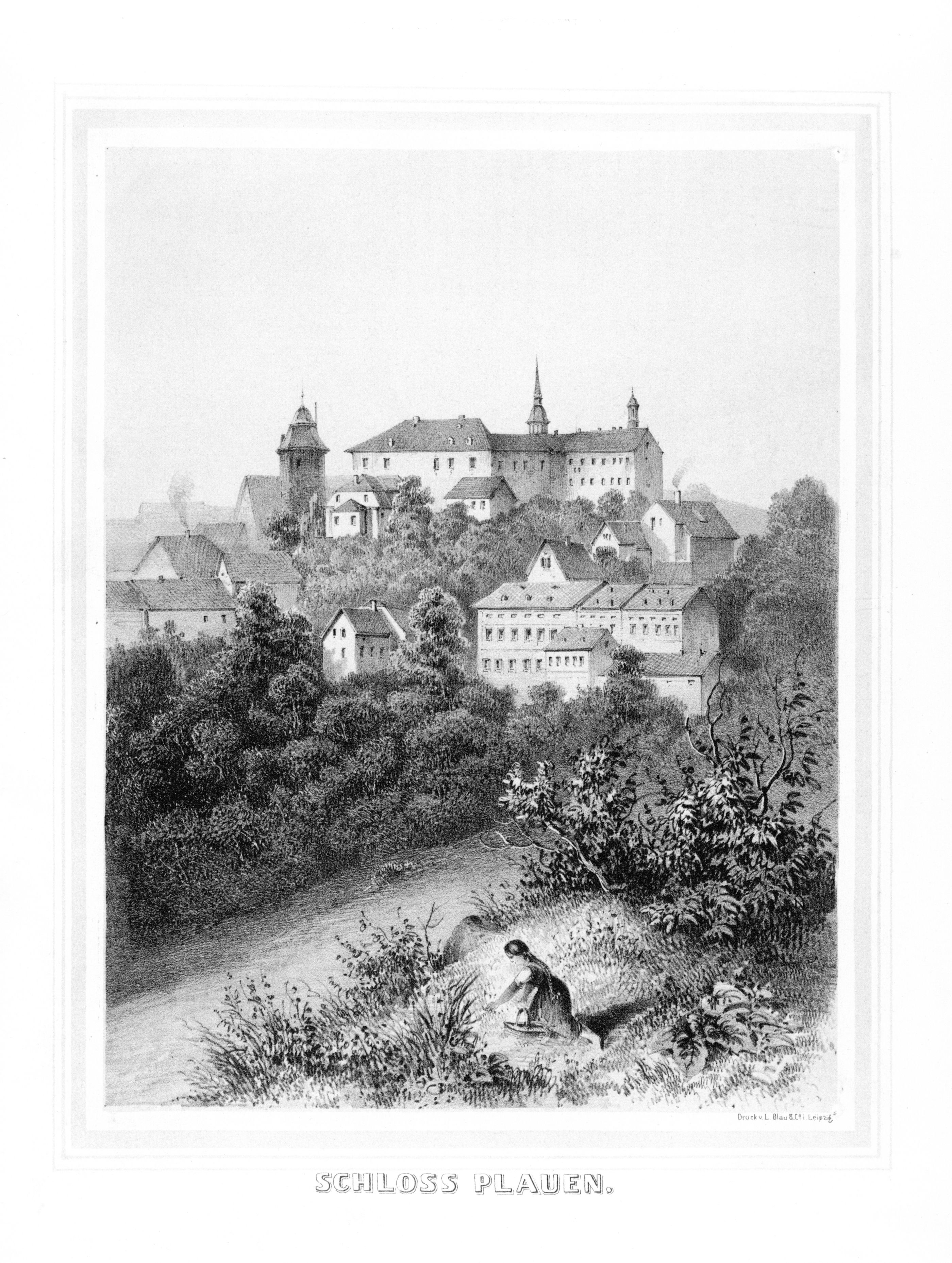 Schloss Plauen aus: Album der Rittergüter und Schlösser im Königreiche Sachsen Voigtländischer Kreis Section: V